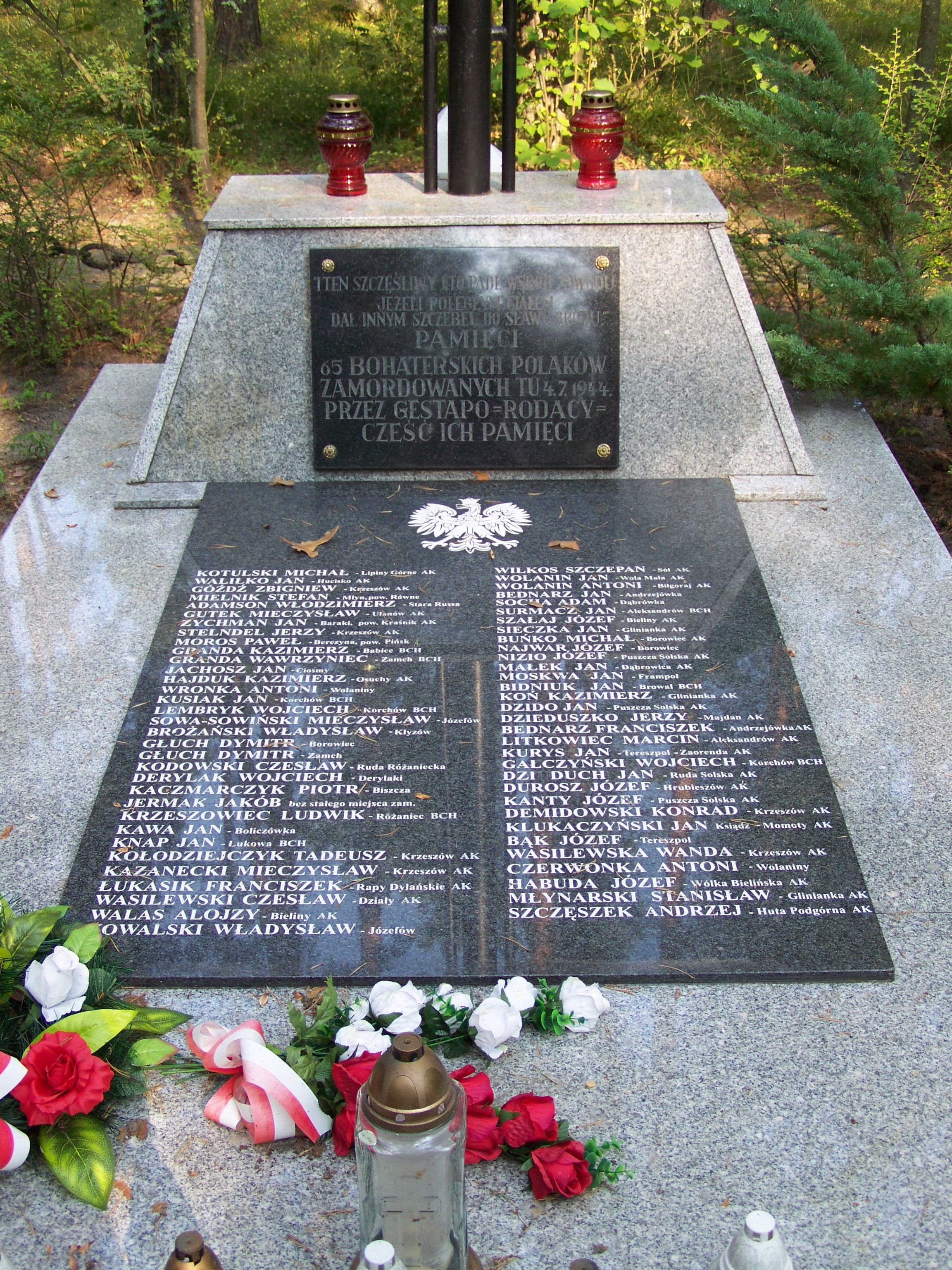 Miejsce egzekucji partyzantów, jeńców bitwy pod Osuchami, zamordowanych na Rapach przez hitlerowców w 1944 roku.